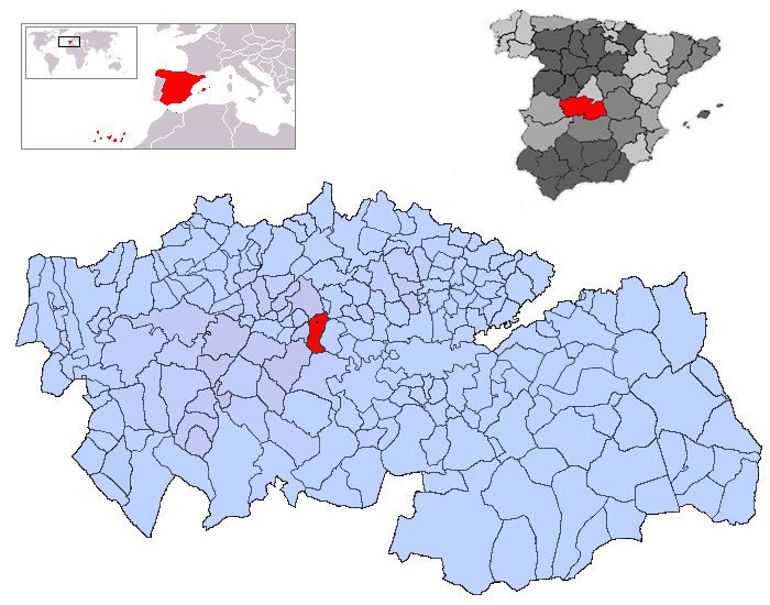 Carmena en la provincia de Toledo